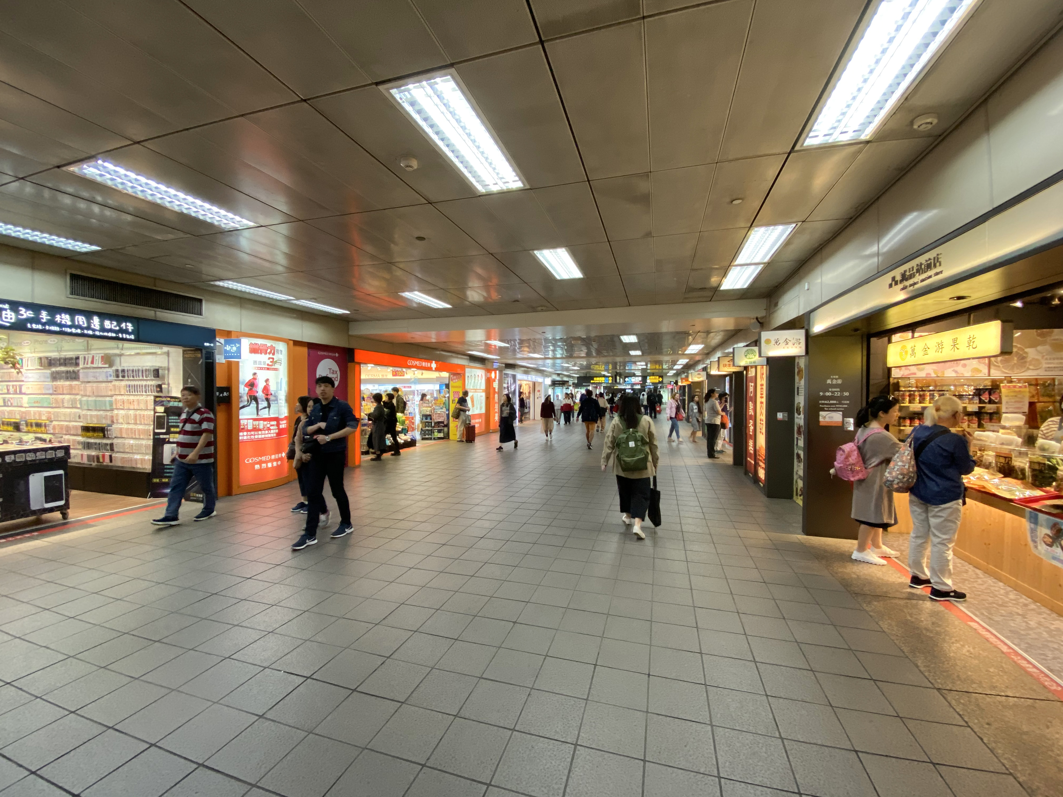 Taipei MRT Mall